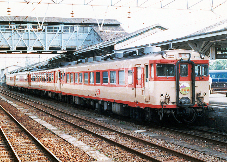 JR九州 急行「えびの」 キハ58 674